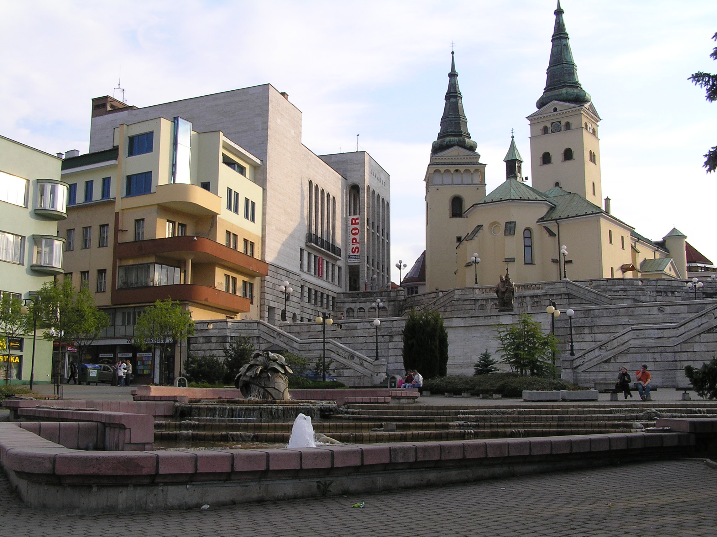 Fontána, divadlo a kostol Námestie Andreja Hlinku, Žilina This medium shows the protected monument with the number 511-1393/1 in the Slovak Republic.